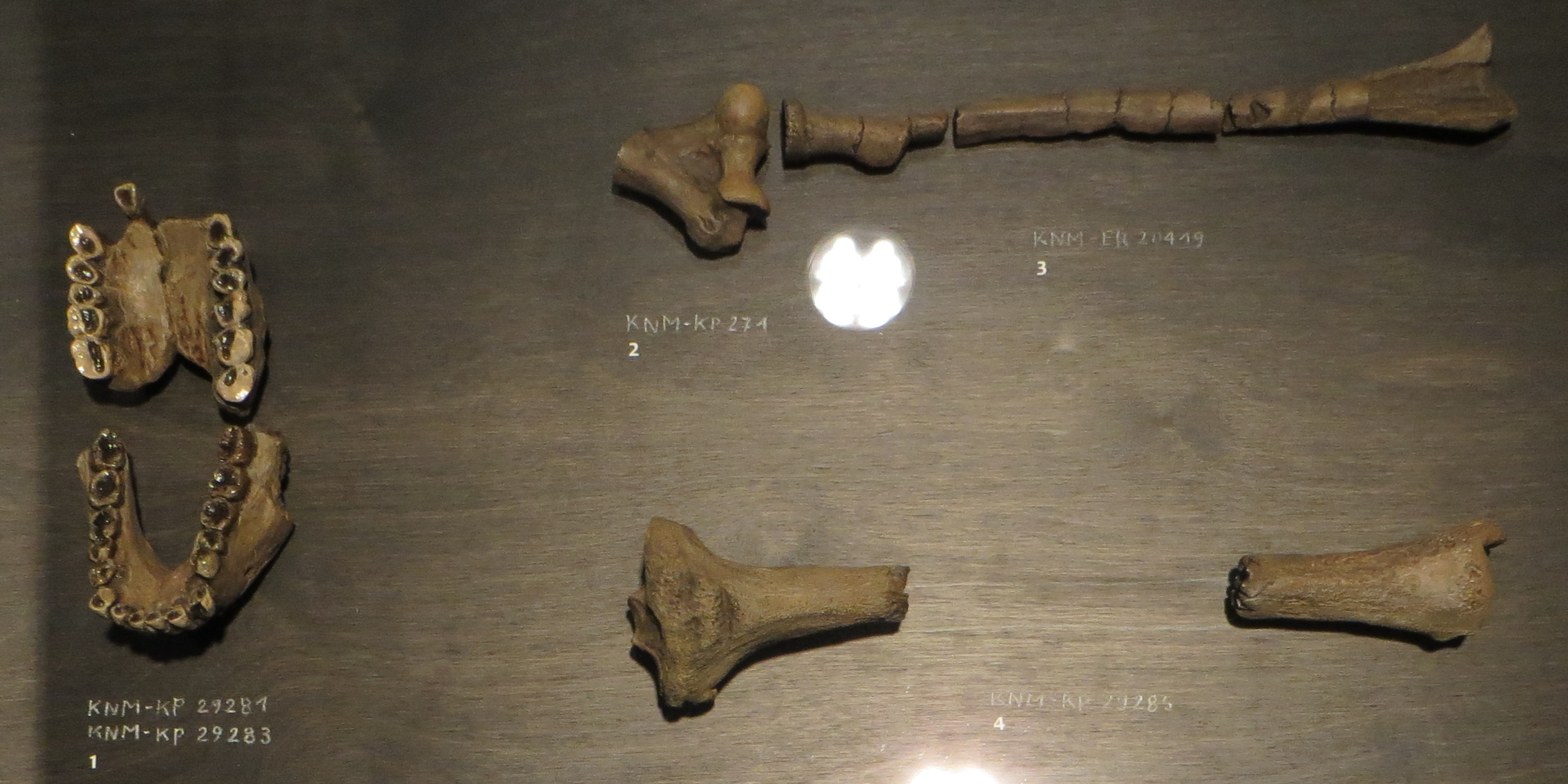 Took The picture at Royal Belgian Institute of Natural Sciences, Brussels